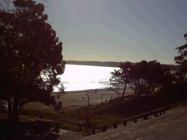 Playa Mansa de Atlántida. Playa Mansa de Atlántida, Canelones, República Oriental del Uruguay